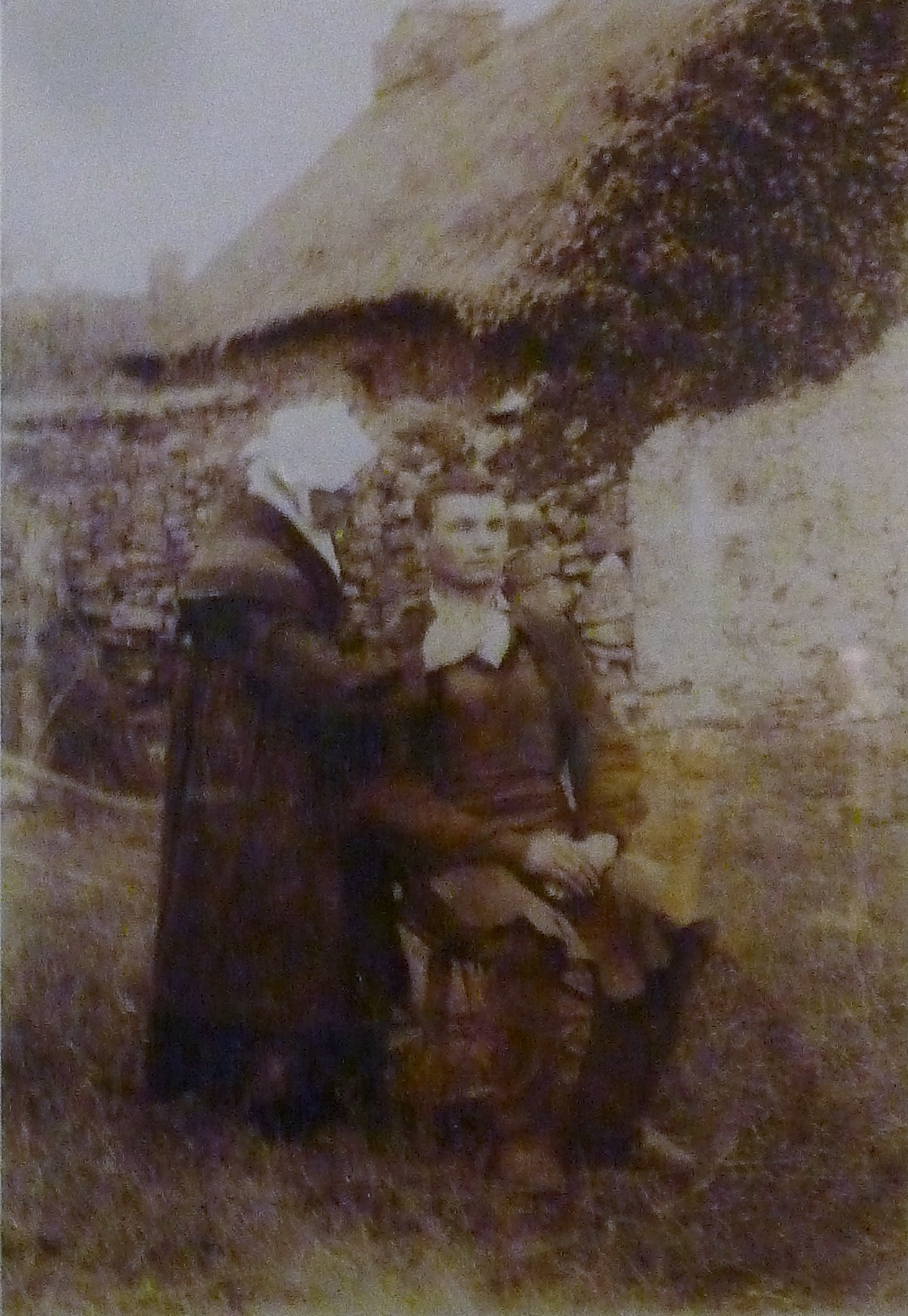 Rebouteuse (photographie de Charles Géniaux prise à Muzillac en 1890, MUCEM, Marseille).